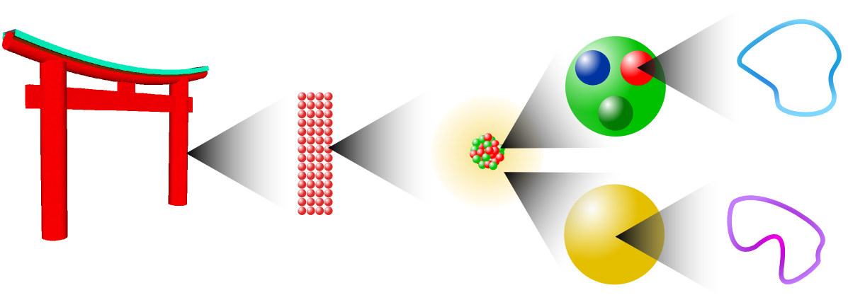 Différentes échelles de grossissement jusqu'au niveau des cordes.